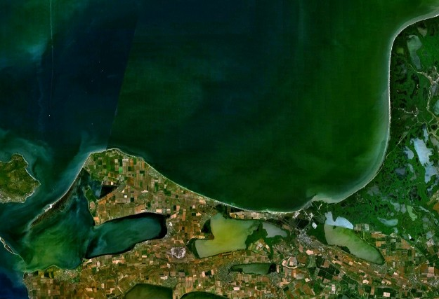 Темрюкский и Таманский заливы